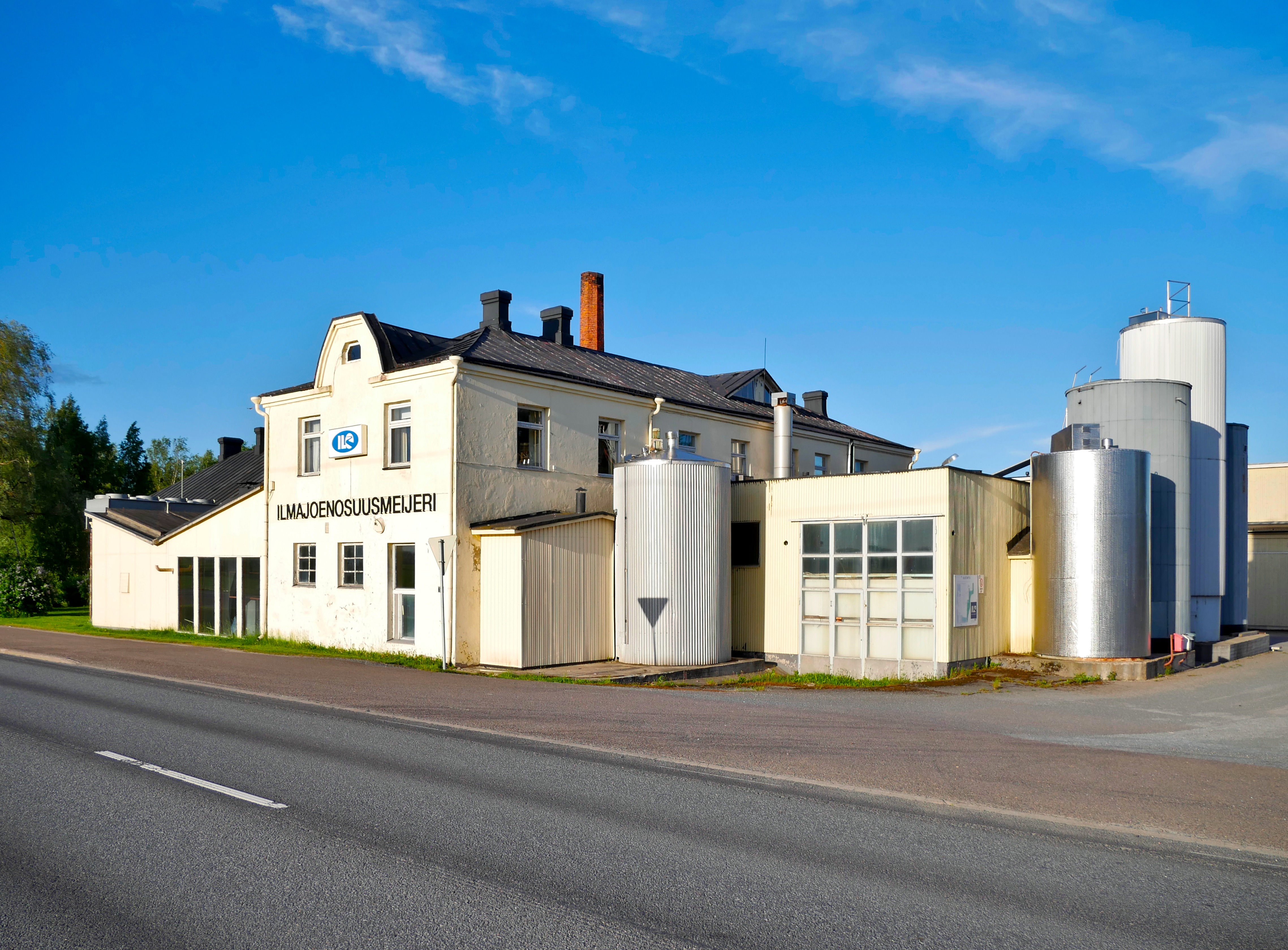 Ilmajoen Osuusmeijeri Ilmajoella.